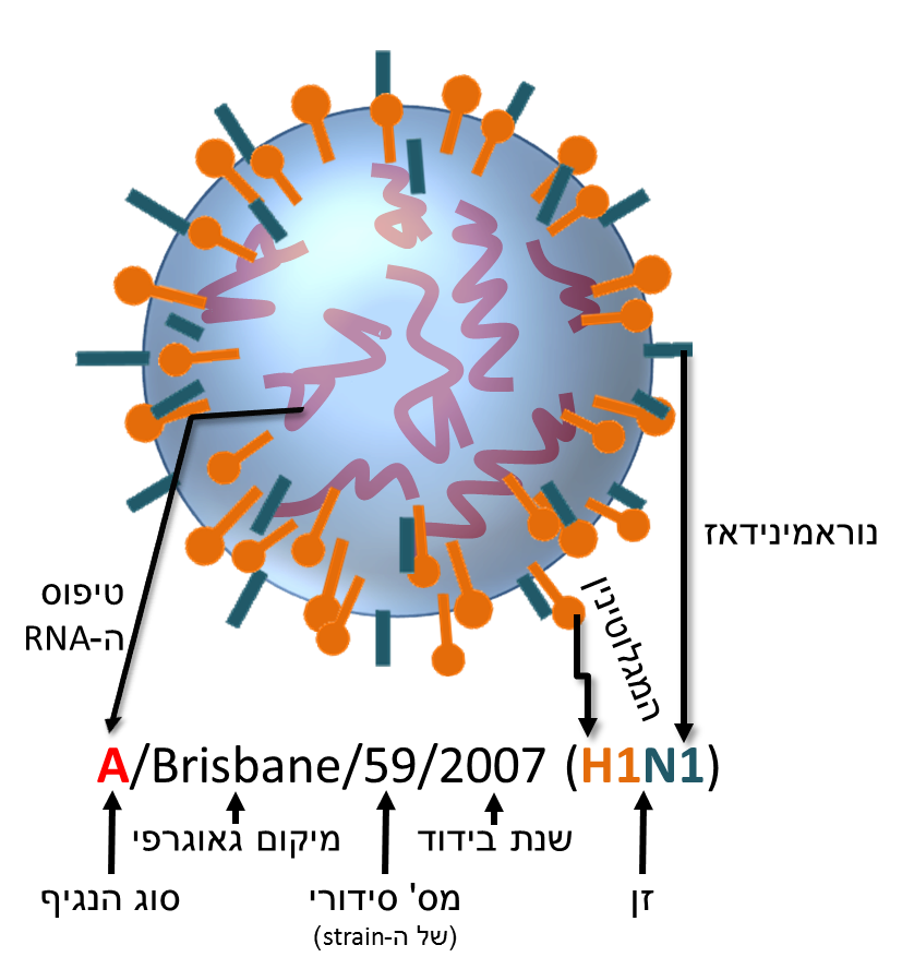 סיווג נגיפי שפעת